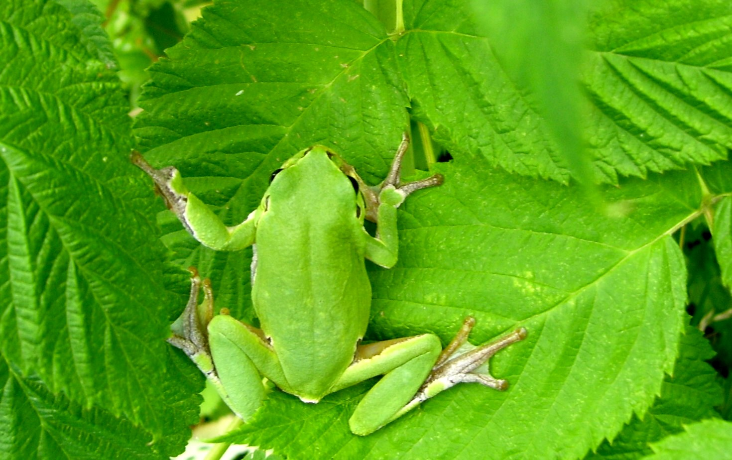 Zöld levelibéka Dunabogdányban